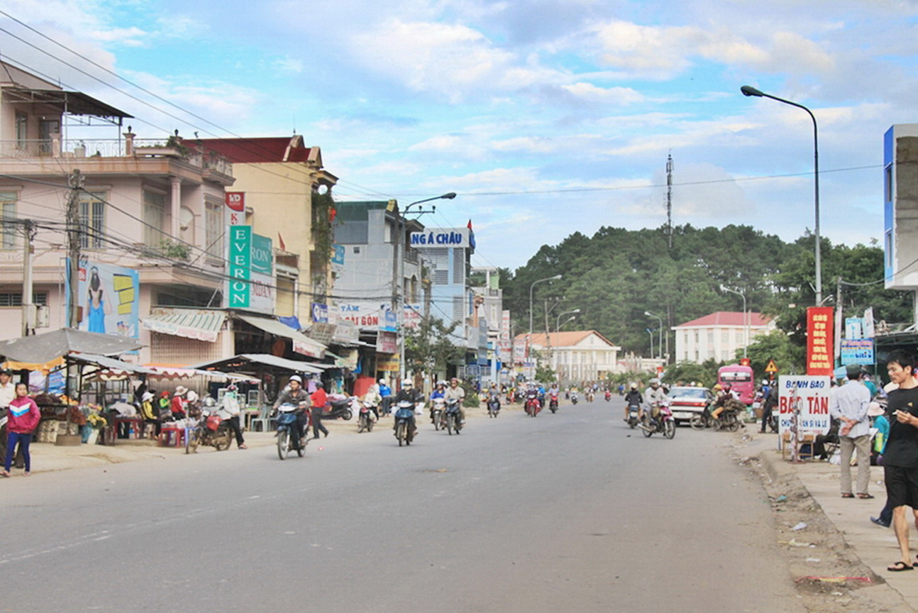 Thị trấn Đinh Văn, Lâm Hà, Lâm Đồng